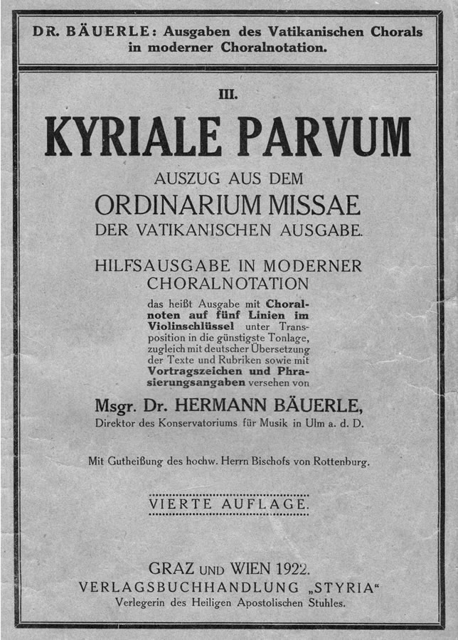 Hermann Bäuerle: Kyriale parvum, gregorianische Gesänge in moderner Notation, Graz/Wien 1922